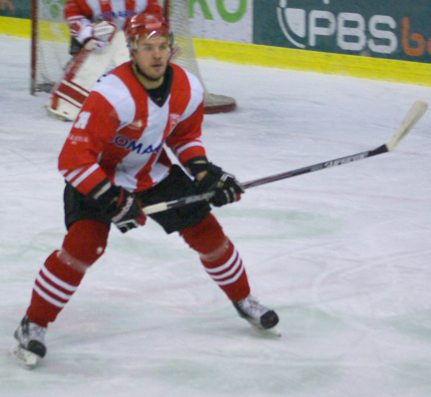 Bartosz Dąbkowski w barwach Cracovii w meczu przeciw STS Sanok (Arena Sanok, 17 stycznia 2016)